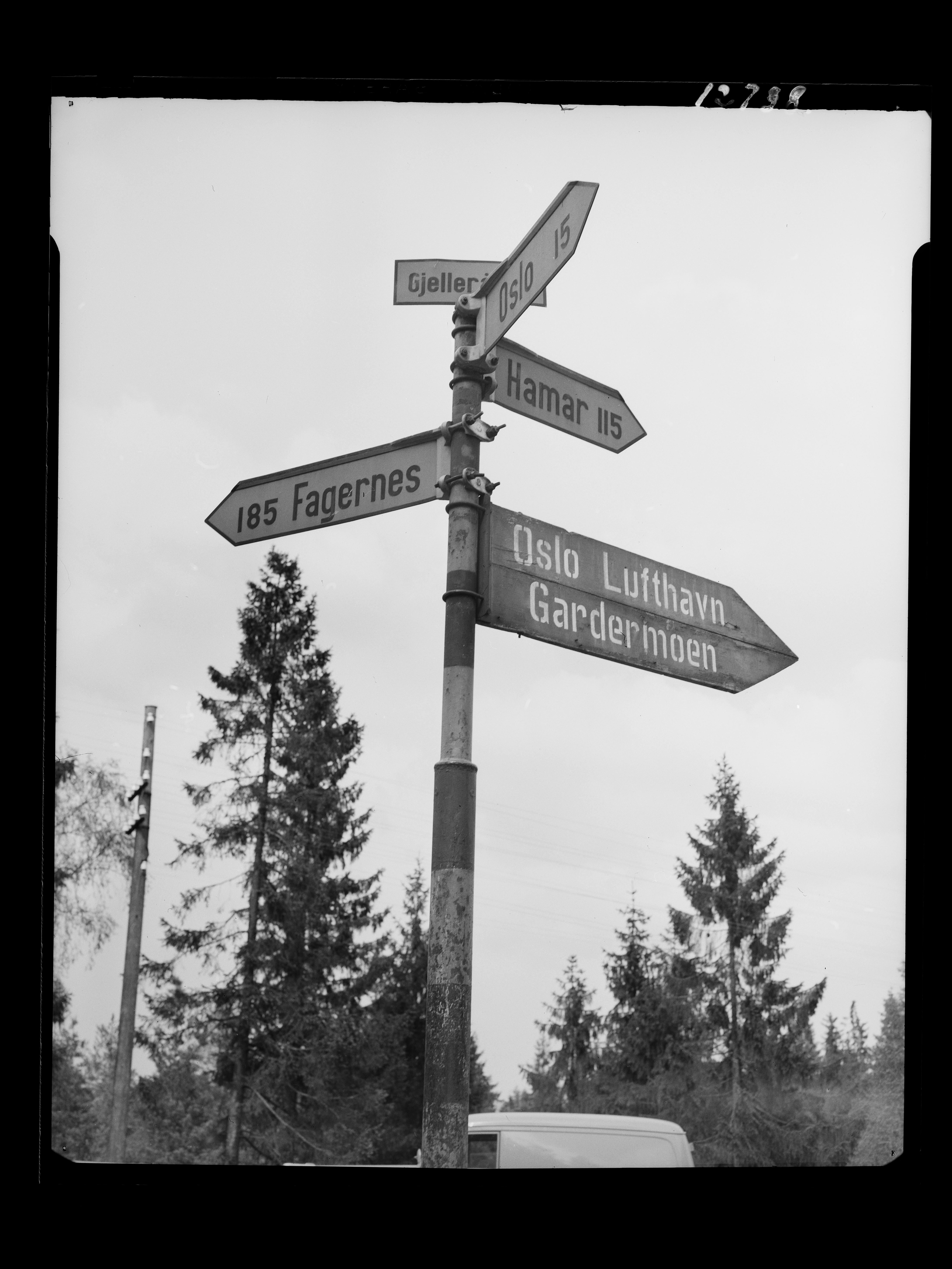 Bildet er hentet fra Nasjonalbibliotekets bildesamling. Anmerkninger til bildet var: Fotograf:Ukjent Gjelleråsen, Nittedal, Akershus